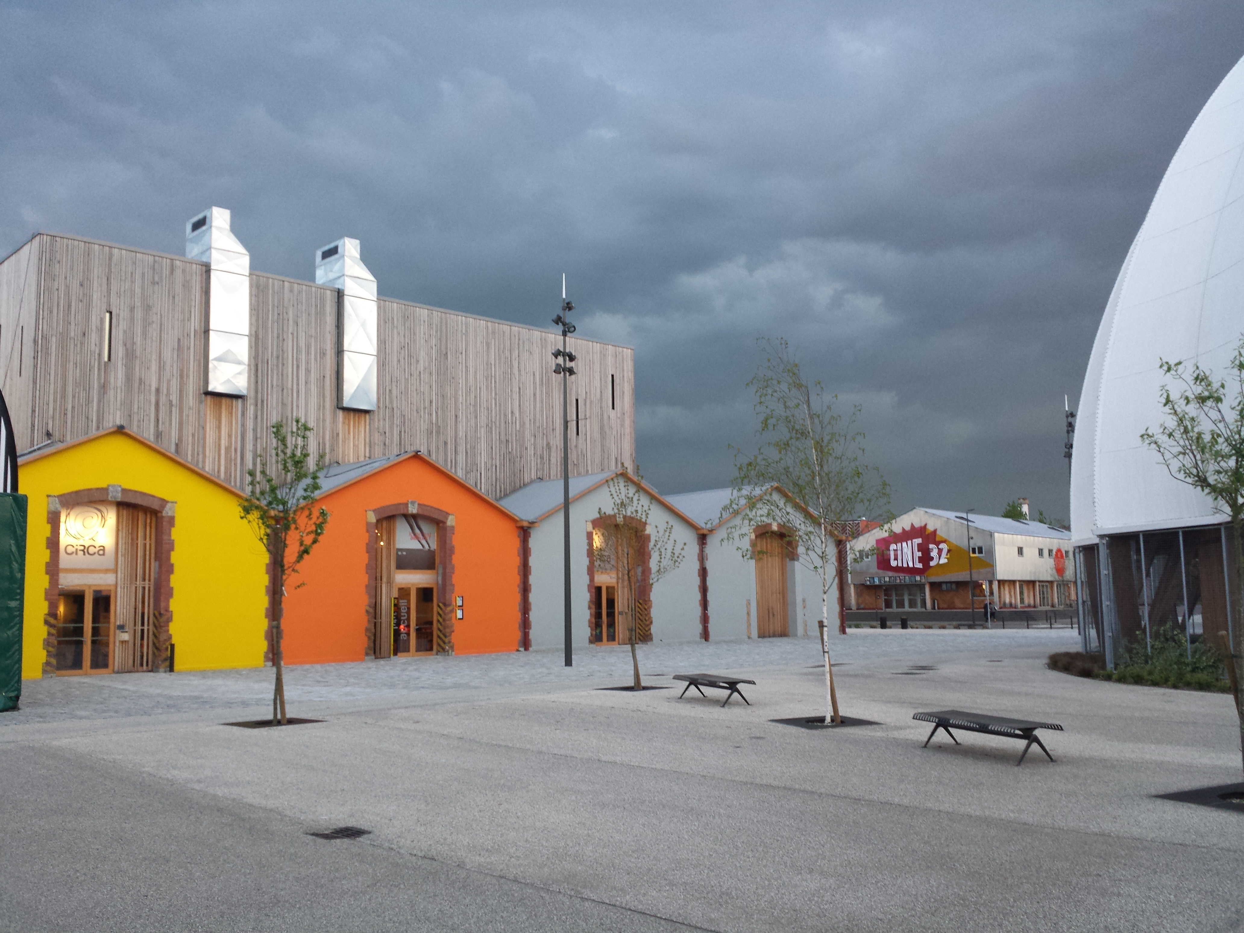 Auch (Gers, France) - Le CIRCa et le cinéma 'Ciné 32', construits à peu près à la même période, sur l'ancienne caserne Espagne de Auch.